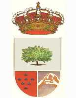 Escudo de Santomera Región de Murcia